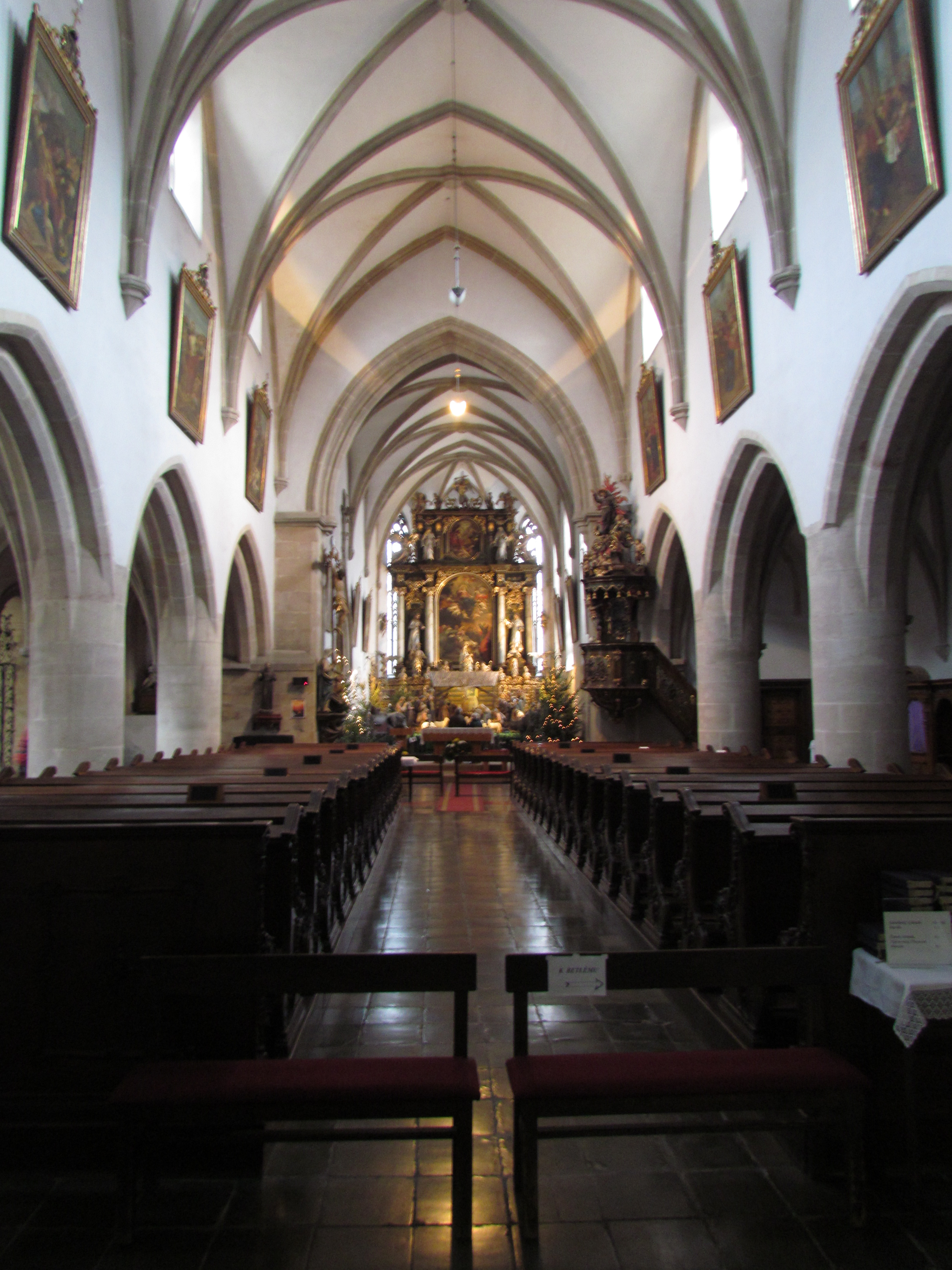 Kostel Nanebevzetí Panny Marie v Plzni